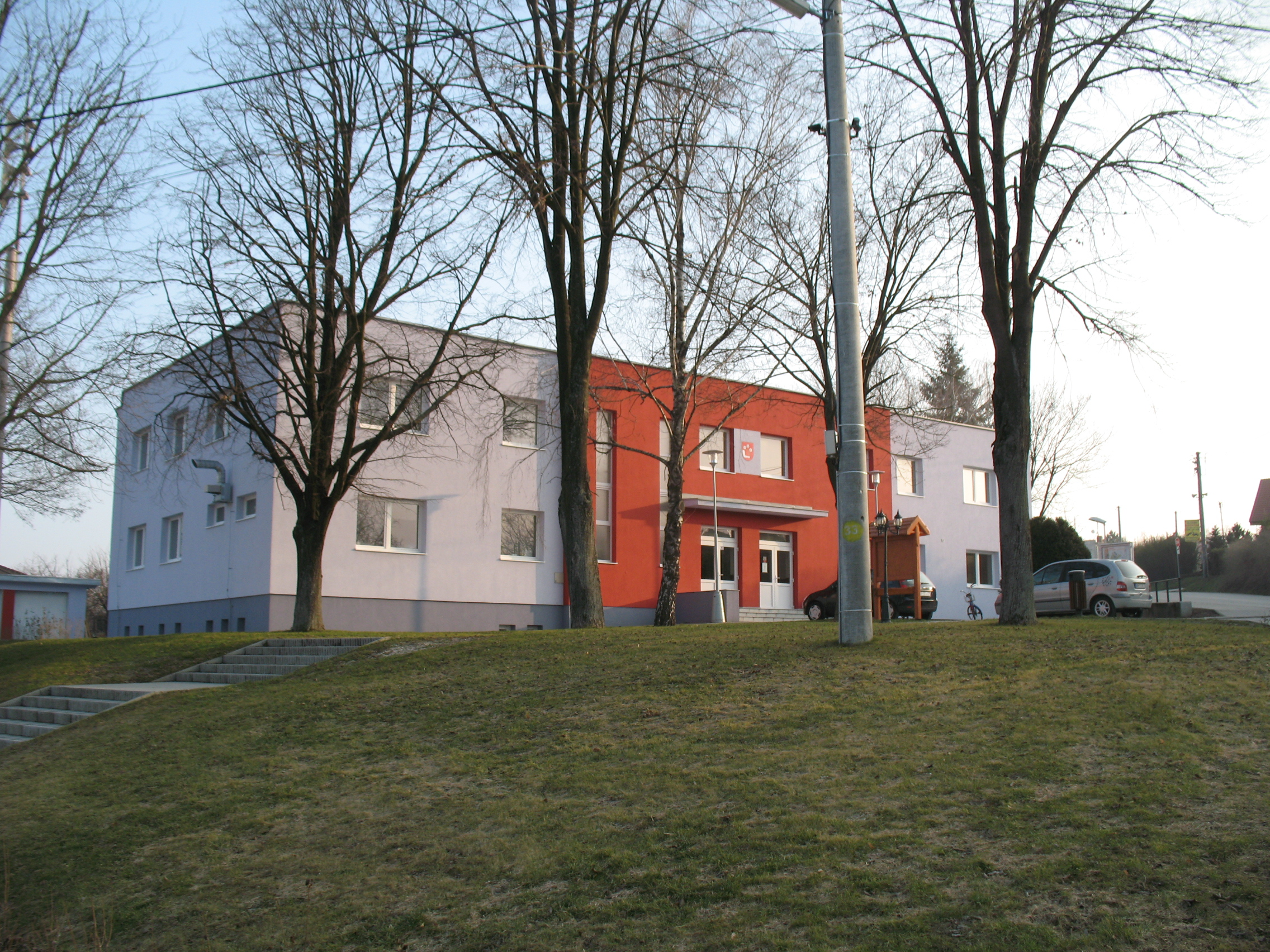 Lapásgyarmat